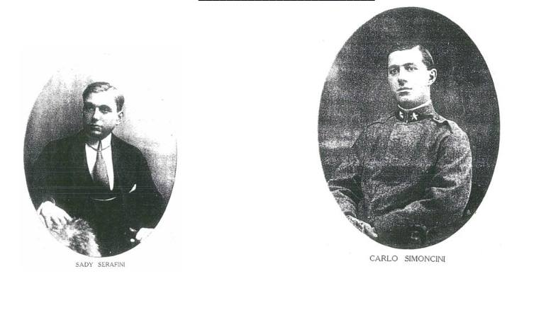 Sady Serafini e Carlo Simoncini, unici volontari sammarinesi caduti durante la Grande Guerra